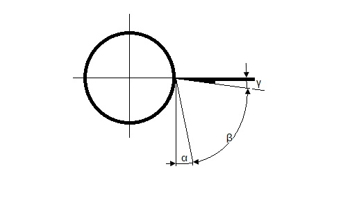 Correct position of the angle of incidence